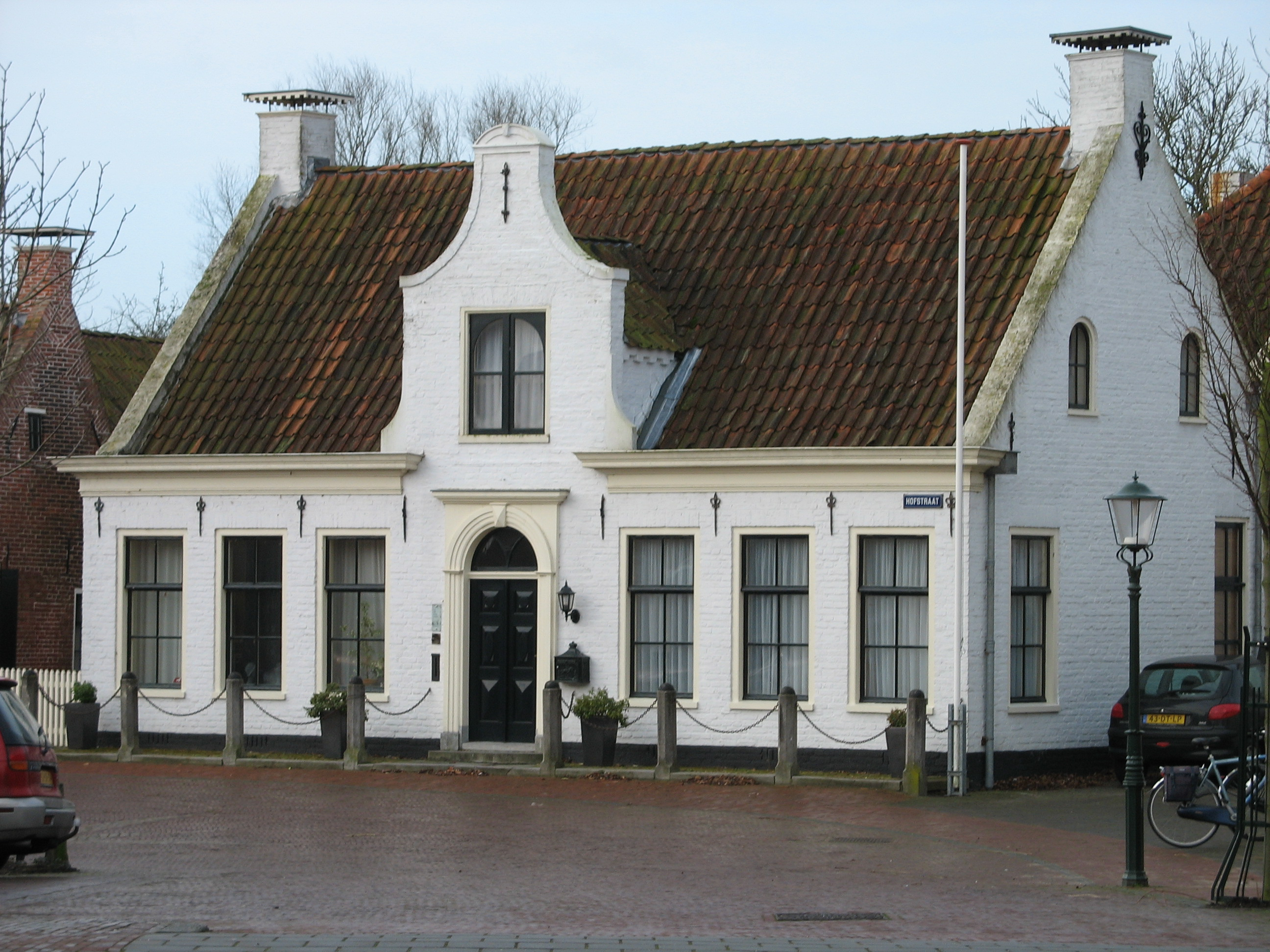 Hofstraat - Aduard